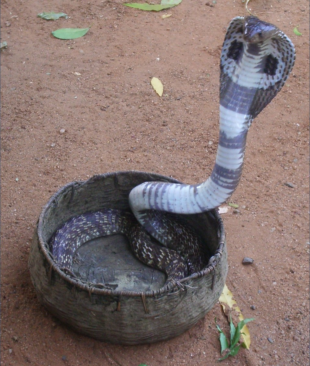 Cobra